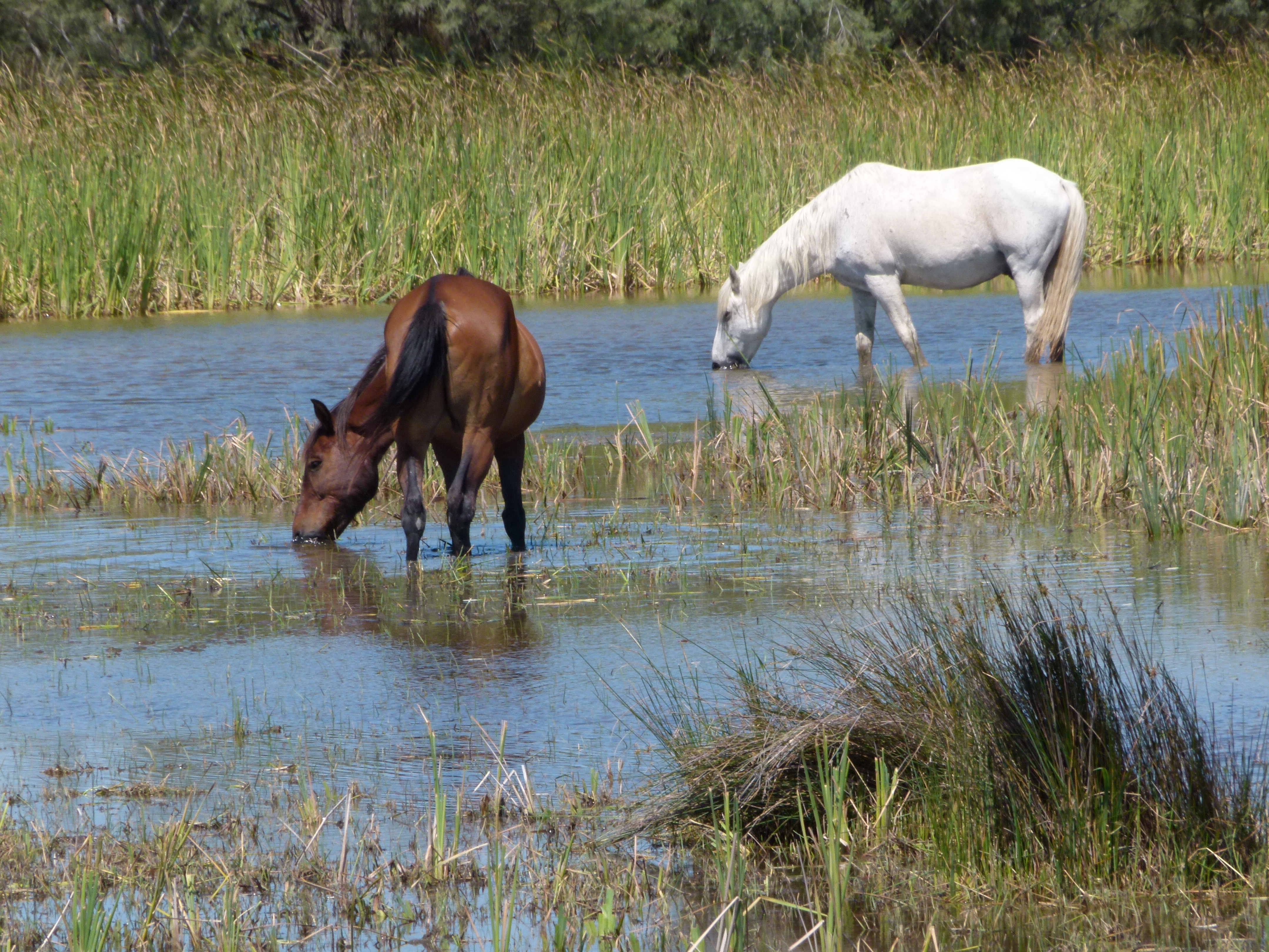 Saintes Maries de la Mer